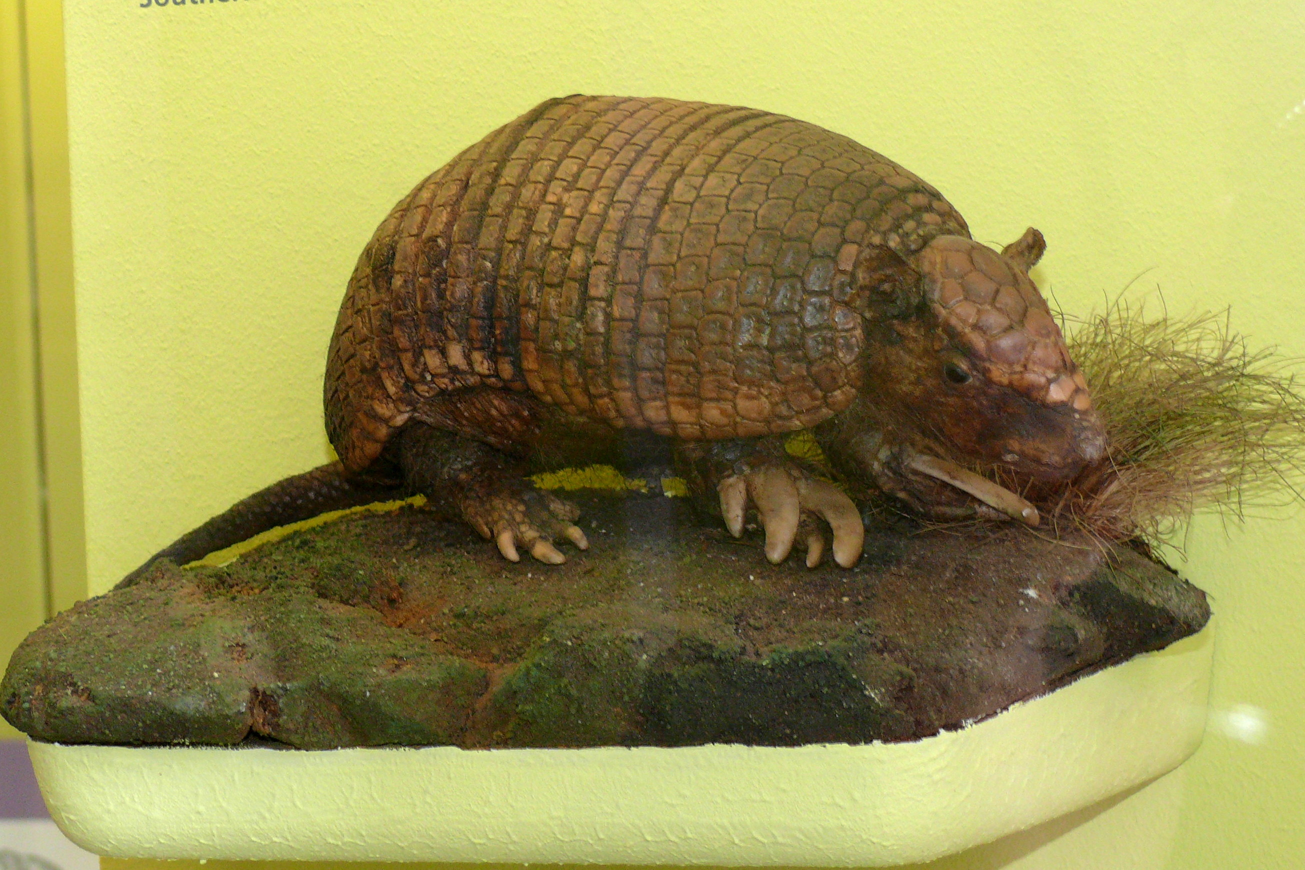 Südliches Nacktschwanzgürteltier (Cabassous unicinctus)